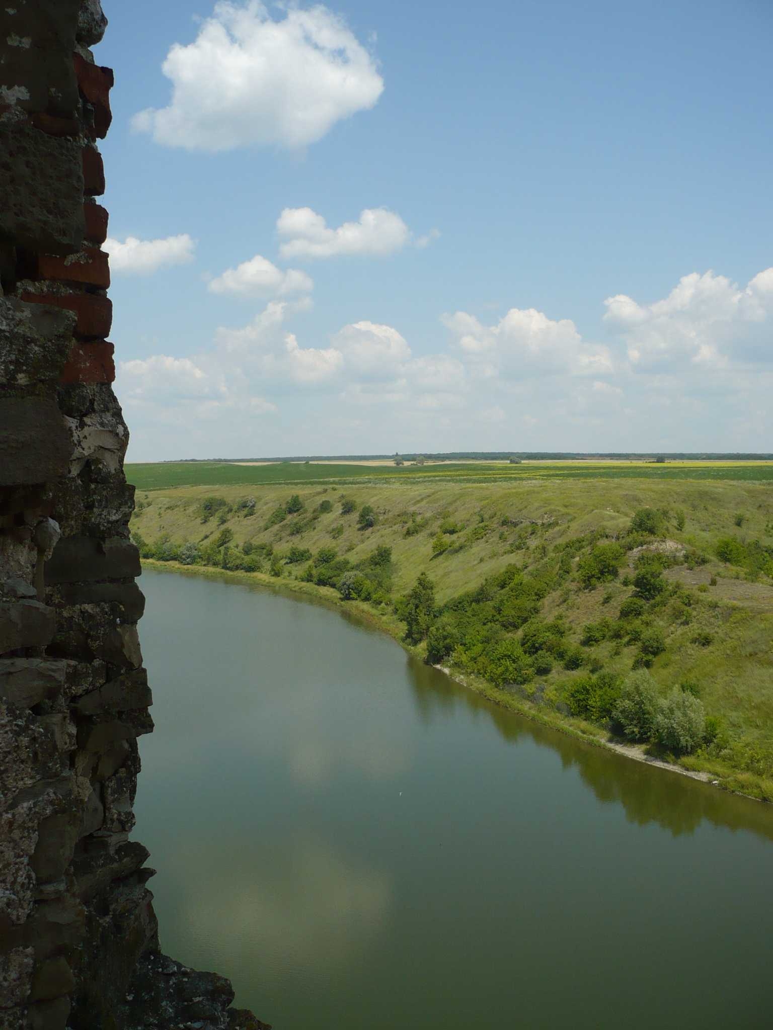 Żwańczyk z zamku w Żwańcu